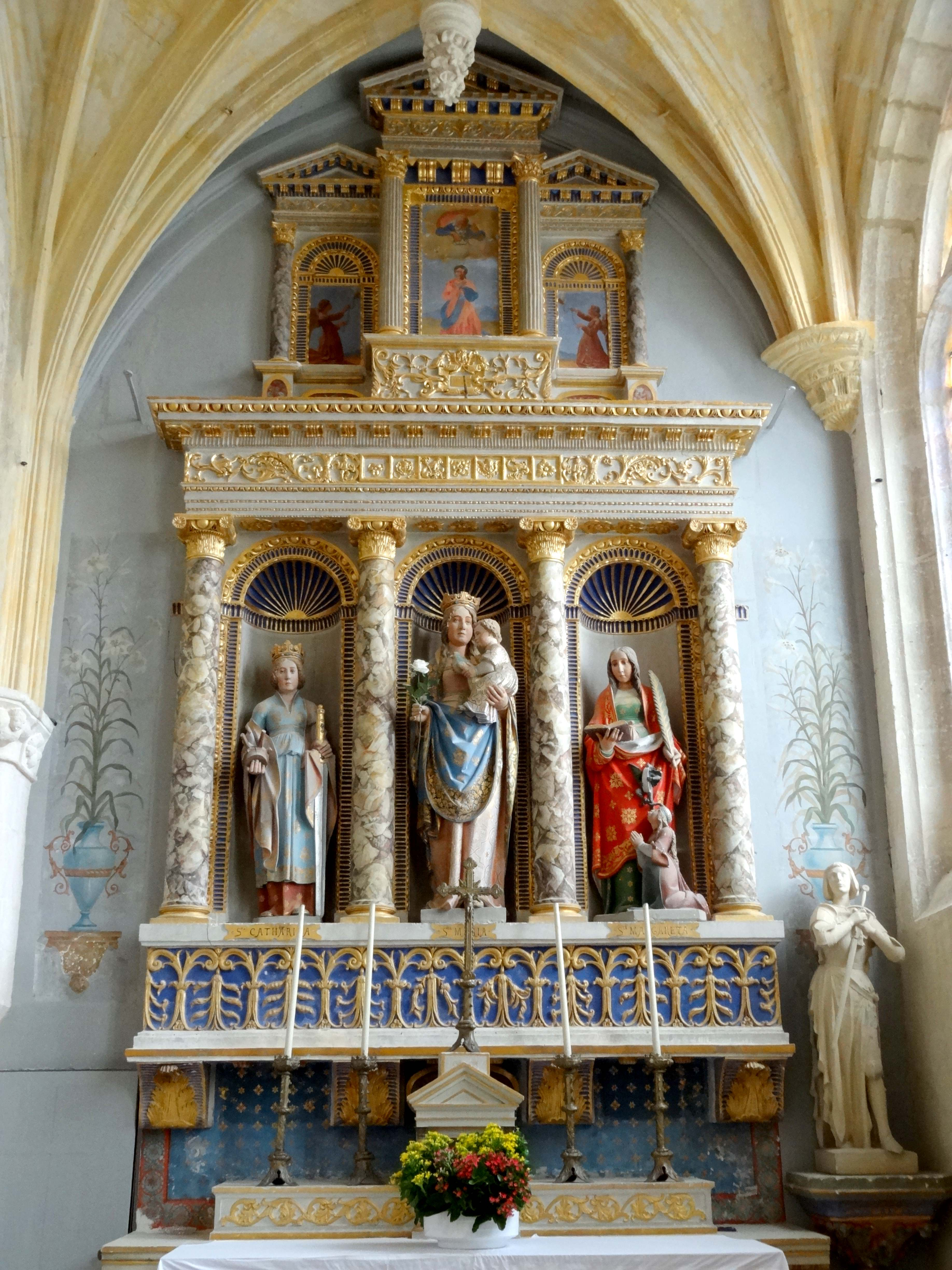 Mobilier de l'église - voir titre.